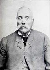 Marthinus